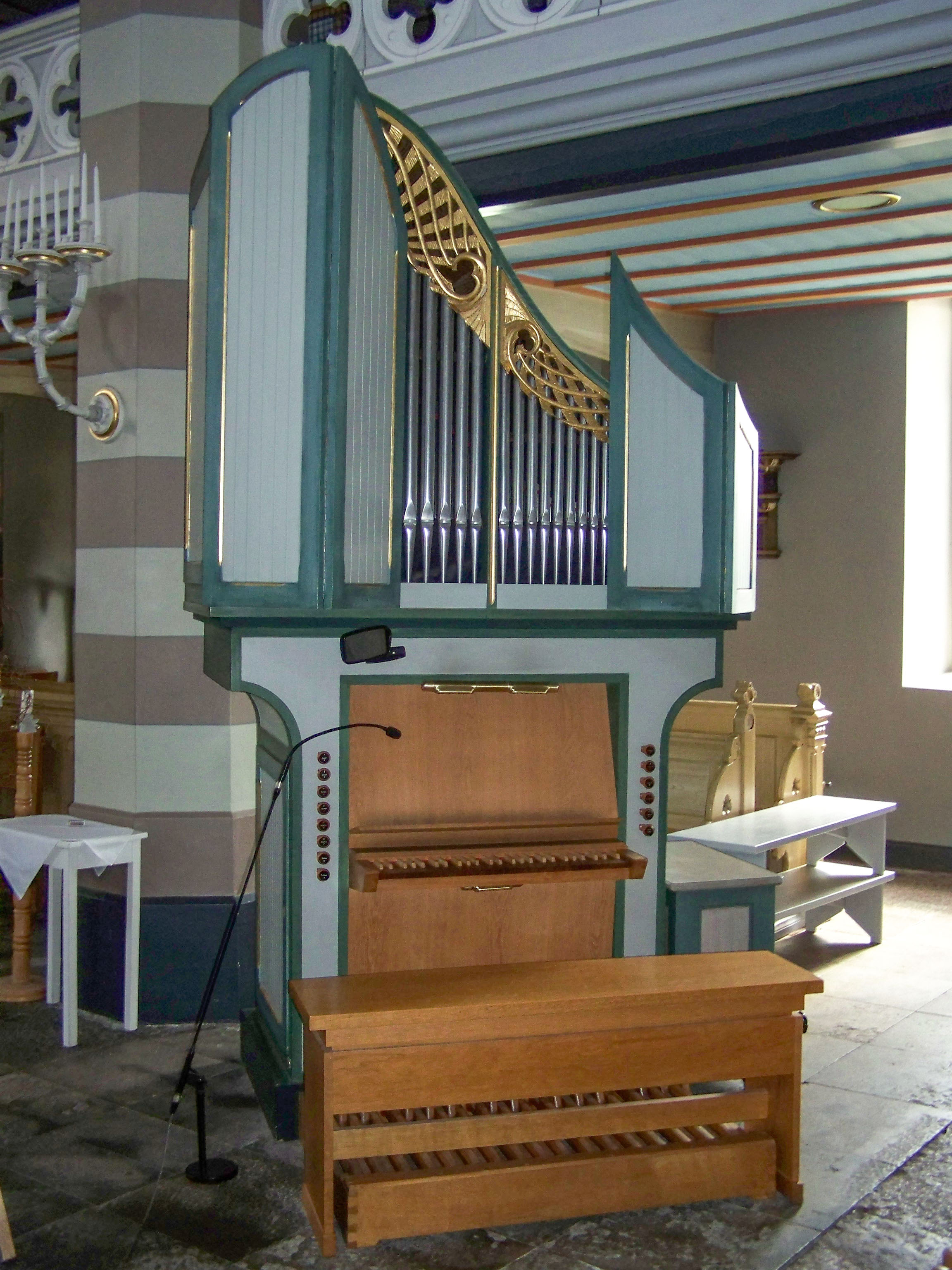 Bräkne-Hoby, Kirche_neue Orgel